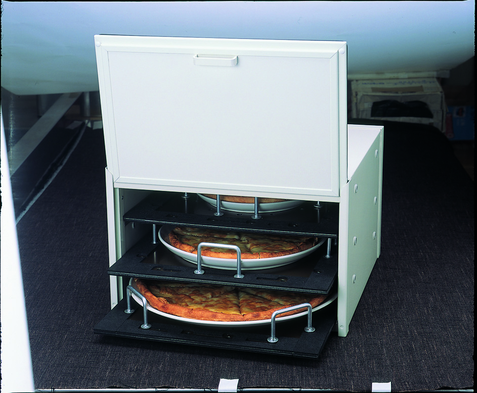 あつエコプレートを用いた提供